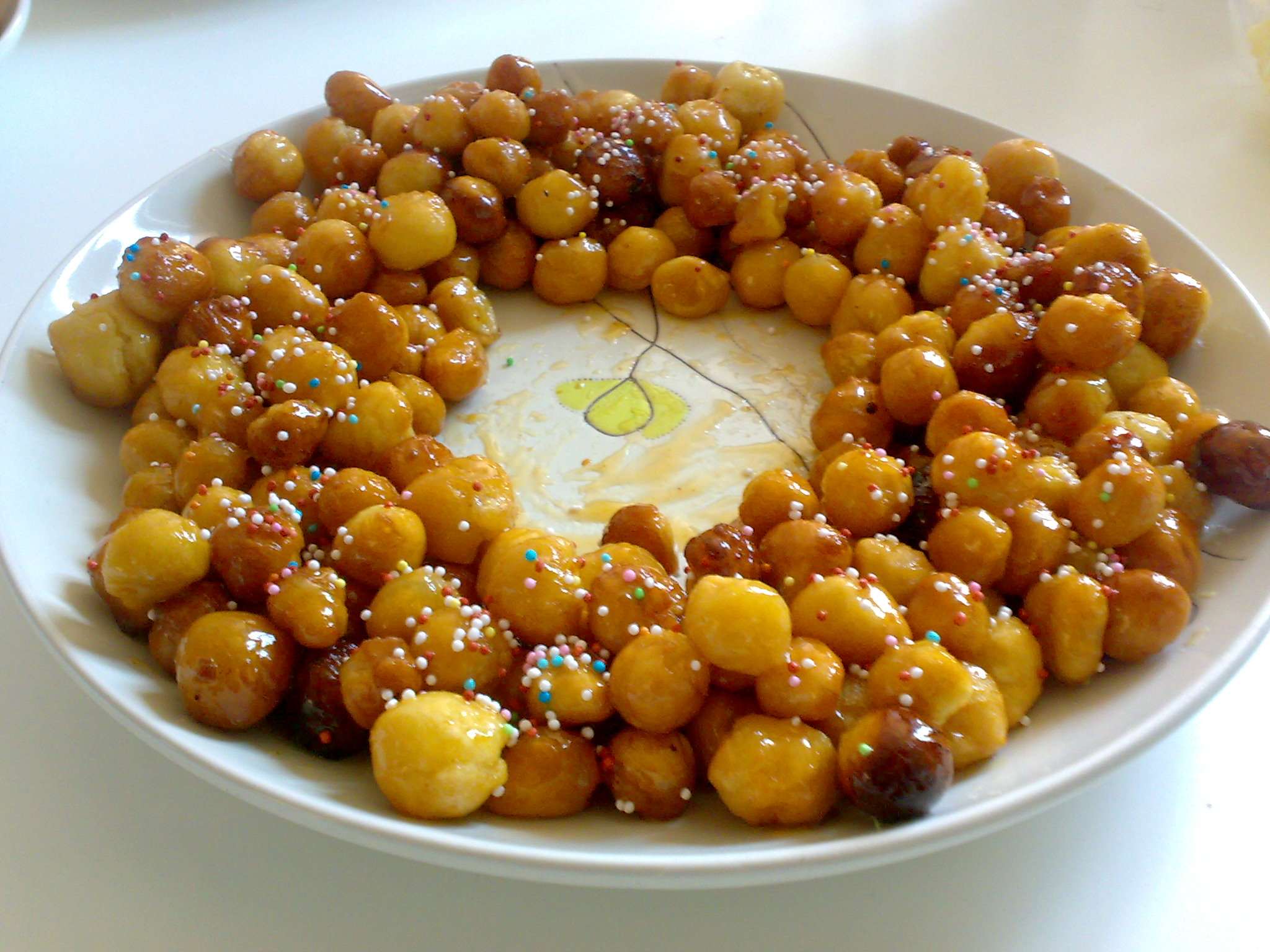 Cicerchiata abruzzese